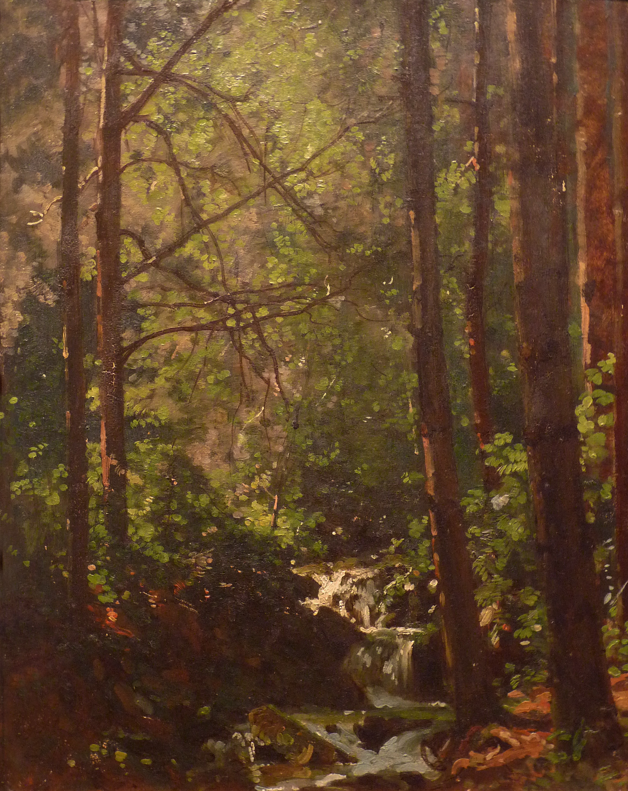 Louis